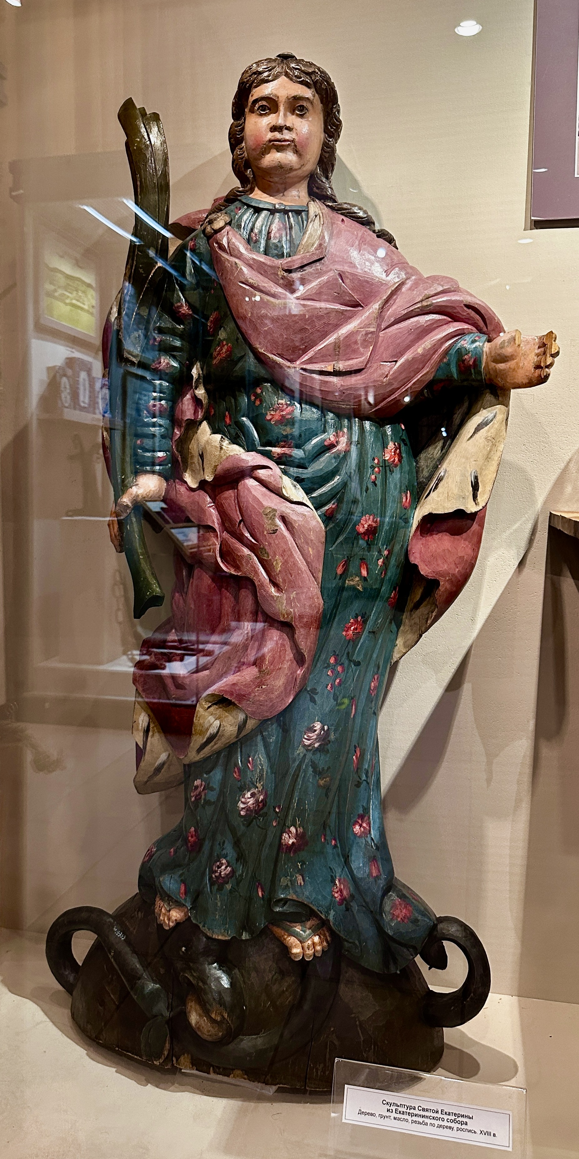 Статуя Святой Екатерины из Екатерининского собора Екатеринбурга. Материал - дерево. Статуя выполнена в XVIII веке. Находится в Музее истории и археологии Урала. Фото 2019 года